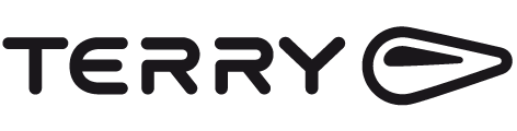 Wortmarke von Terry Comfort